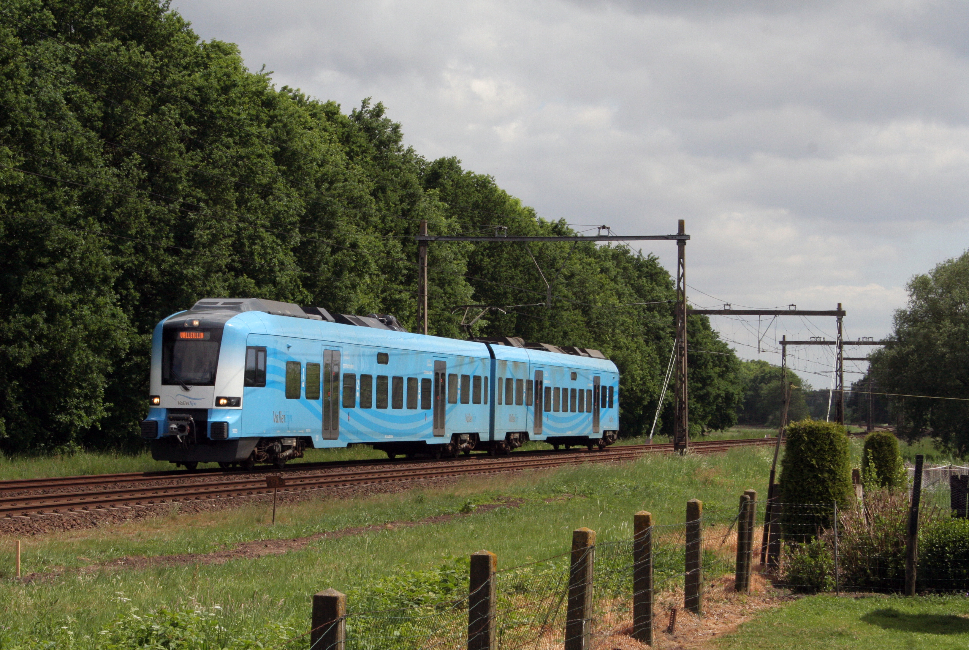 Connexxion 5033 te Hoevelaken